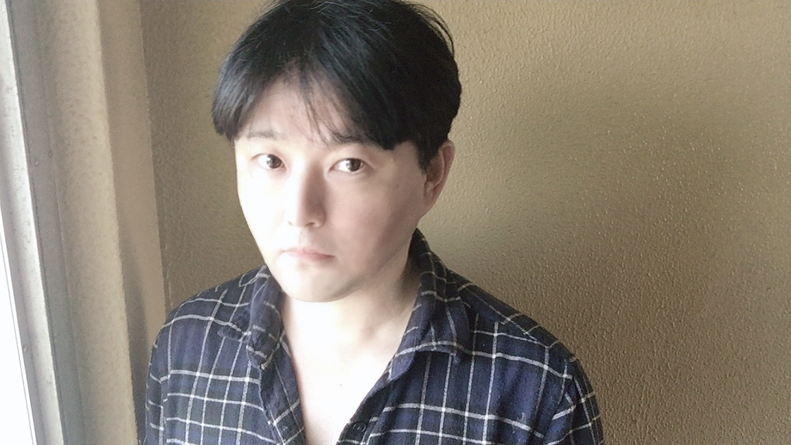 comic artist